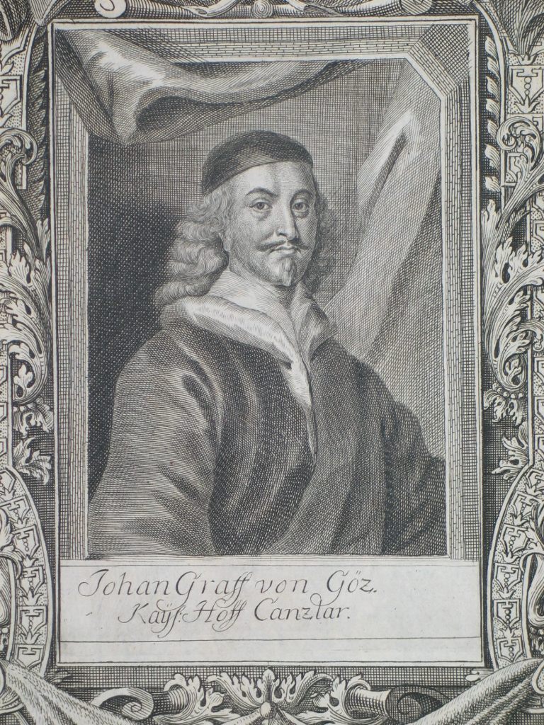 Johan Graff von Göz. Kays. Hoff Canzlar. (Johannes von Götzen, 1599-1645), Kupferstich, 21 x 33 cm